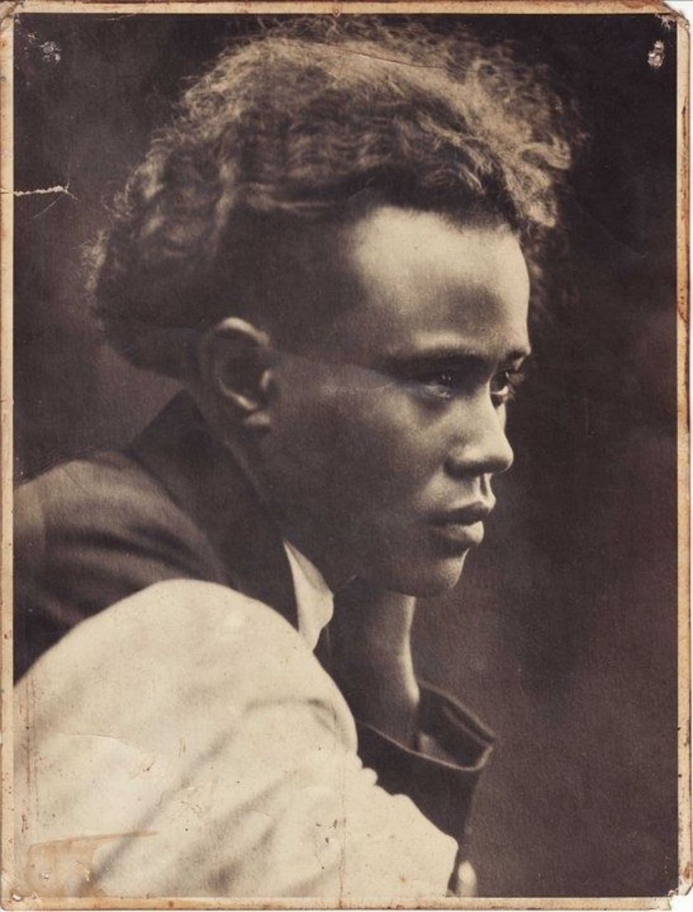 Portrait de Jean-Joseph Rabearivelo